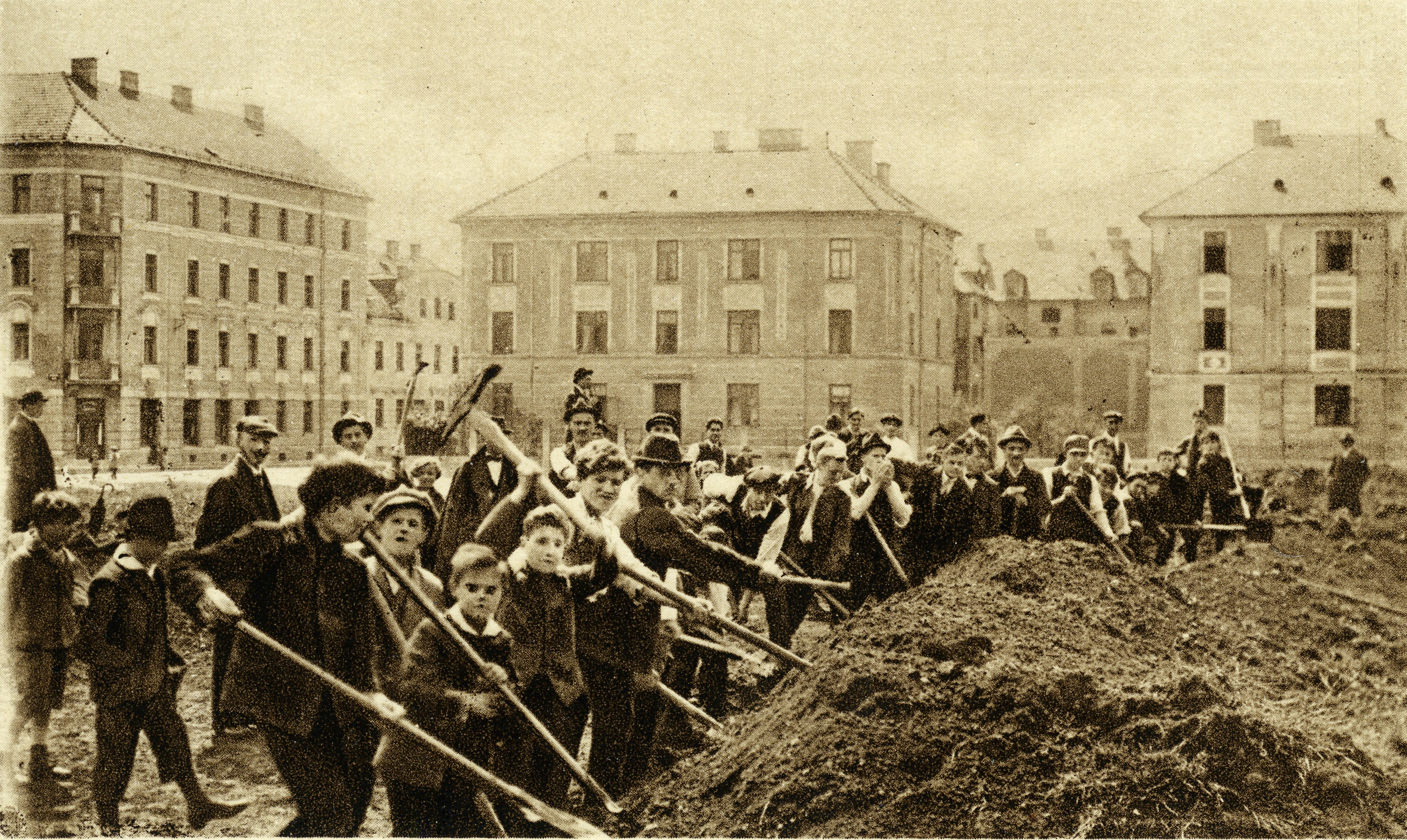 Gradnja sokolskega doma Tabor.